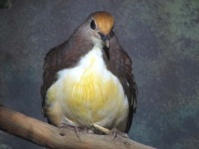 Golden Heart Dove